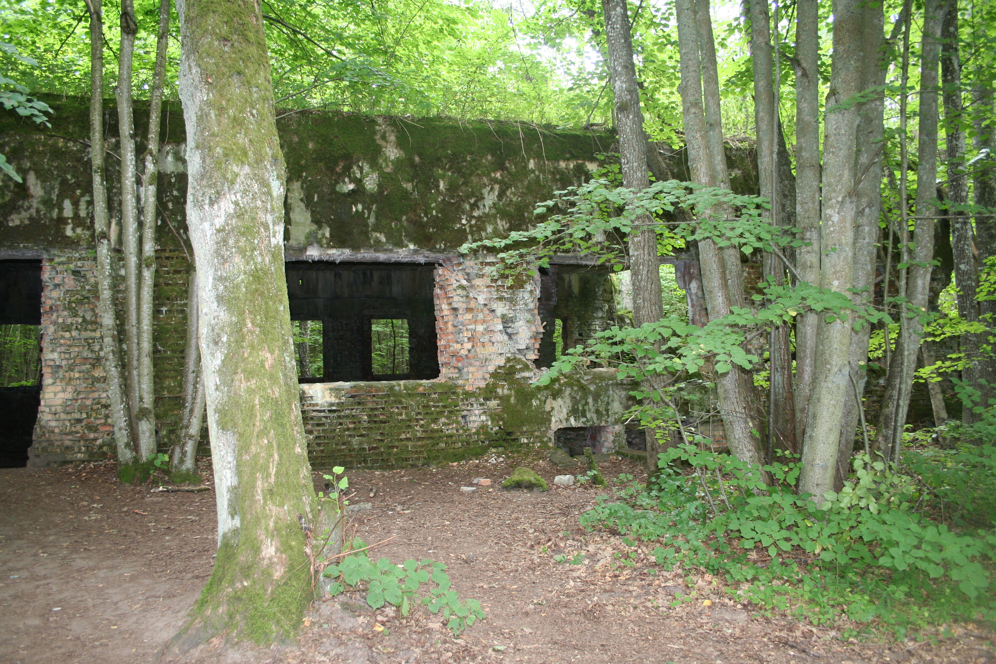 Wolfsschanze